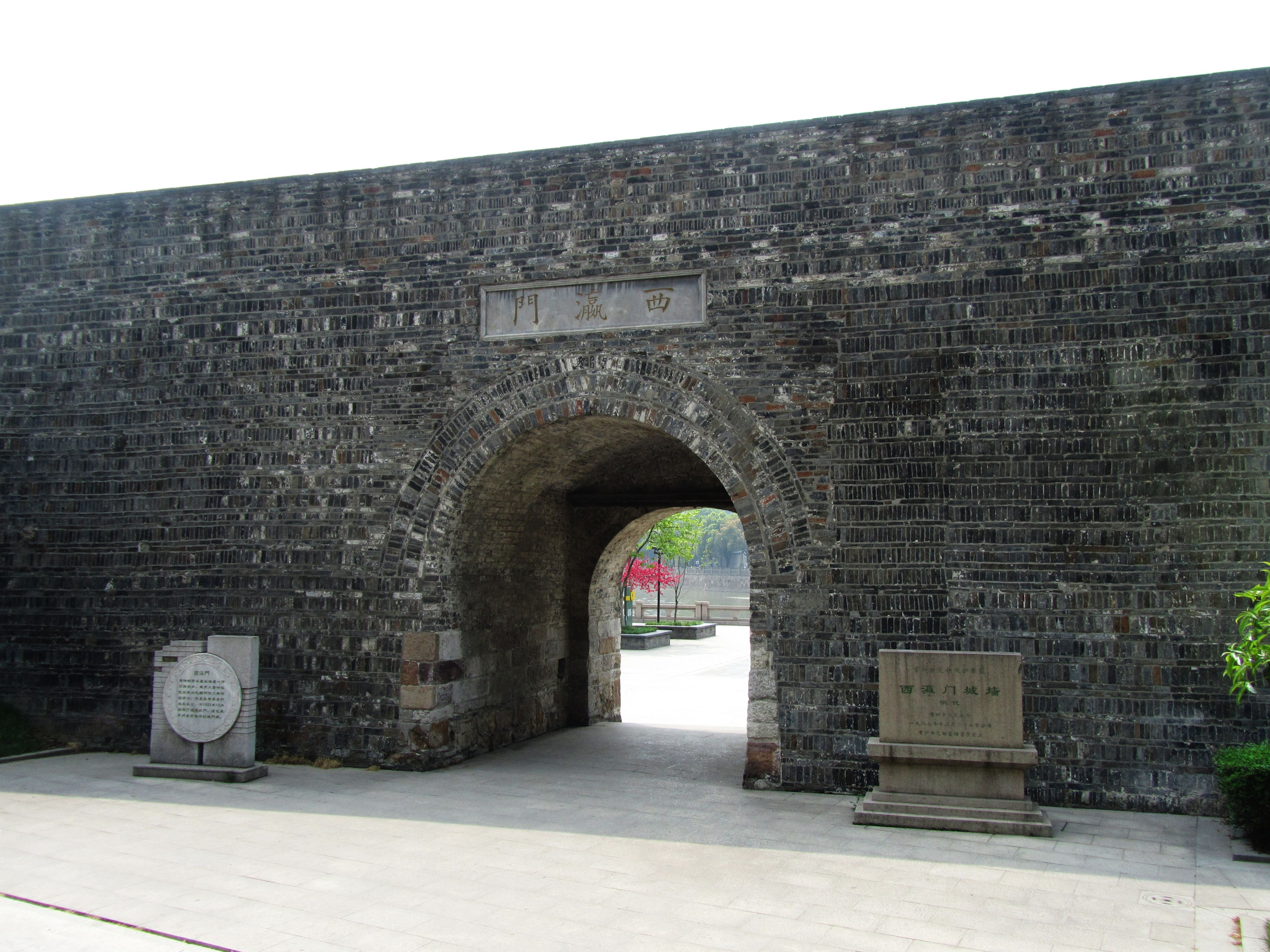 常州城墙西瀛门段，此外在城内（北侧）看东段部分的城门。